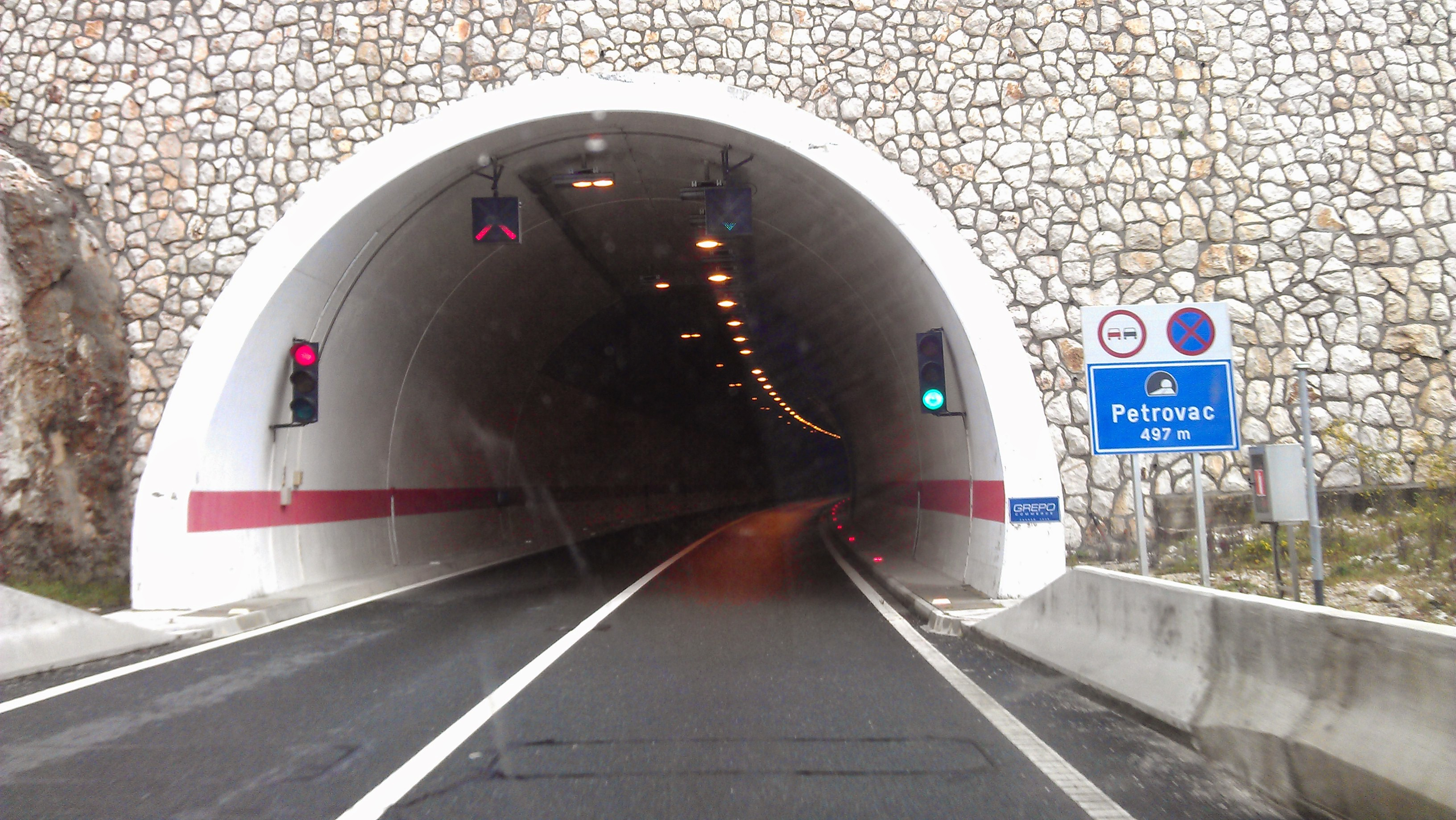 Tunel Petrovac